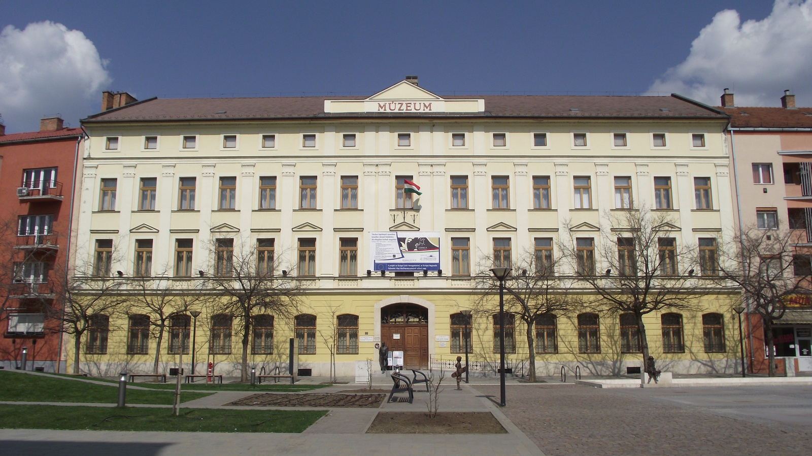 Magyar Király Szálloda (Damjanich János Múzeum) (Szolnok, Kossuth tér 4.) This is a photo of a monument in Hungary. Identifier: 6045